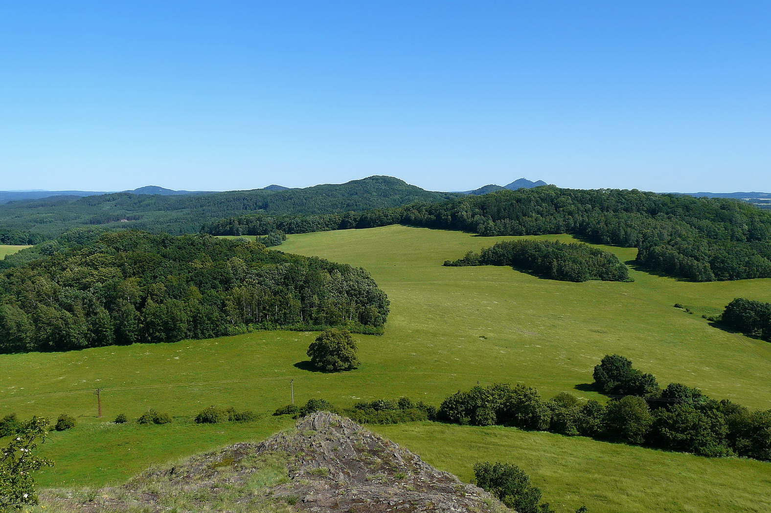 Provodínská pahorkatina z Lysé skály